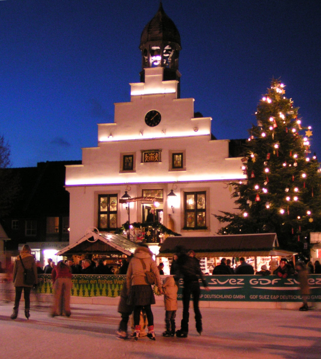 Lingen: Weihnachtsmarkt mit Eisbahn vor dem Rathaus